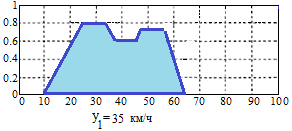 Рис3